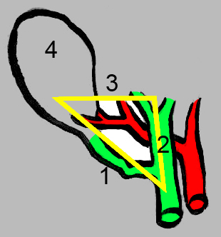 Driehoek van Calot